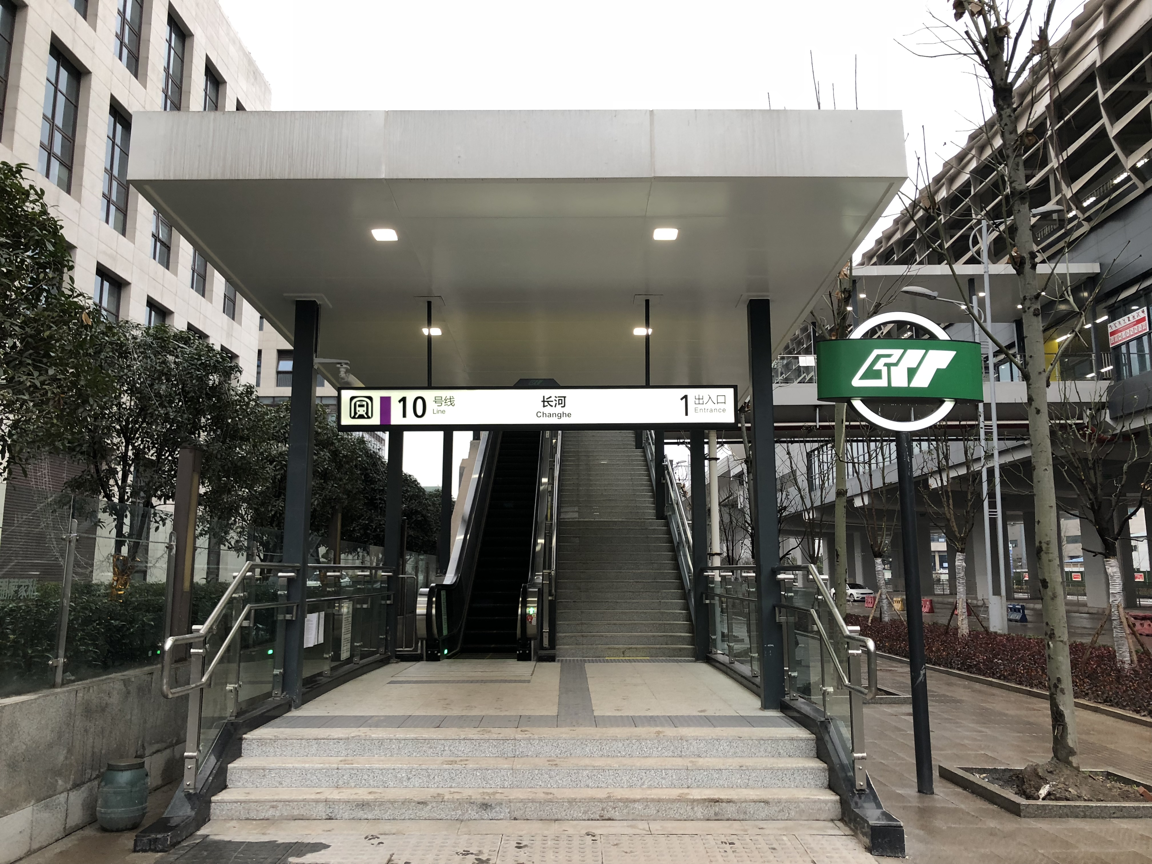 中文（中国大陆）: 10 号线长河站 1 出口